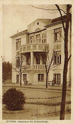 Sanatorium Krukowskiego w Otwocku - obecnie III Liceum